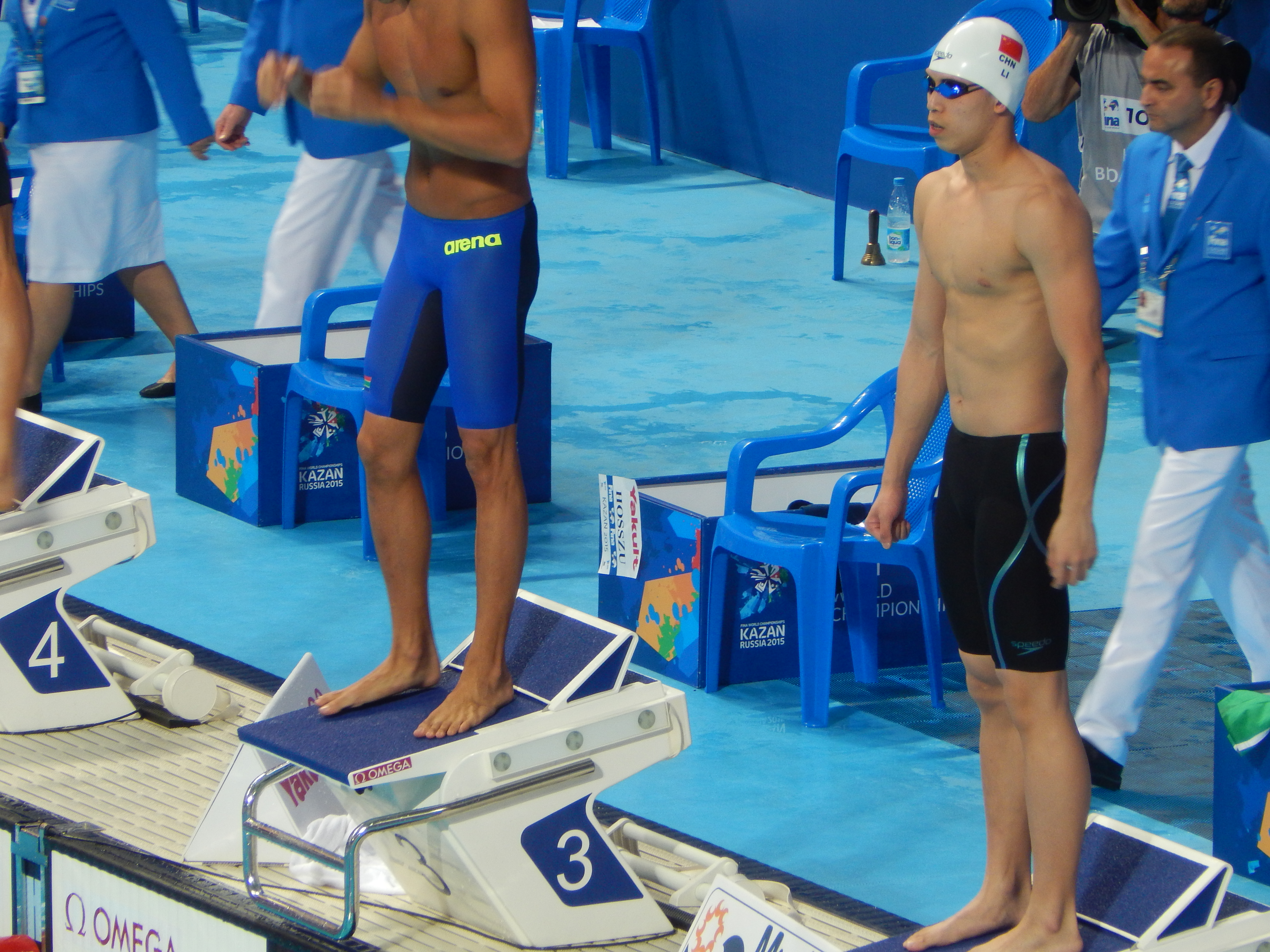 Ли Чжухао в Казани на чемпионате мира, финал 100-метровки баттерфляем